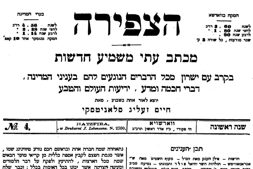 שער עיתון הצפירה